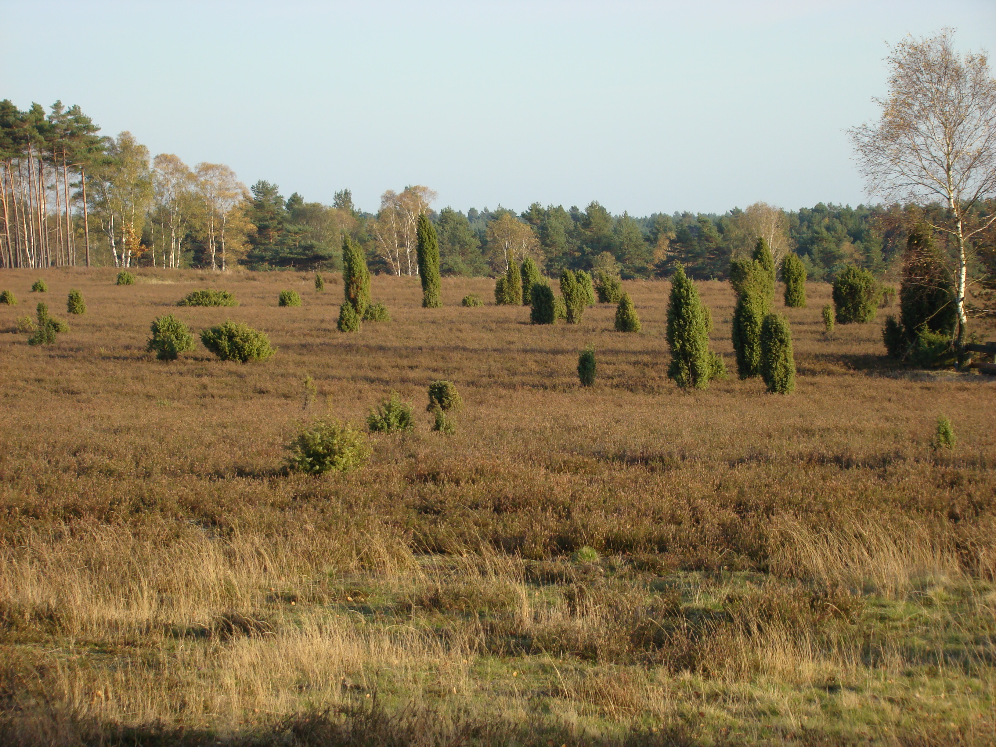 Wacholderheide im Naturschutzgebiet „Mittleres Lüßplateau“